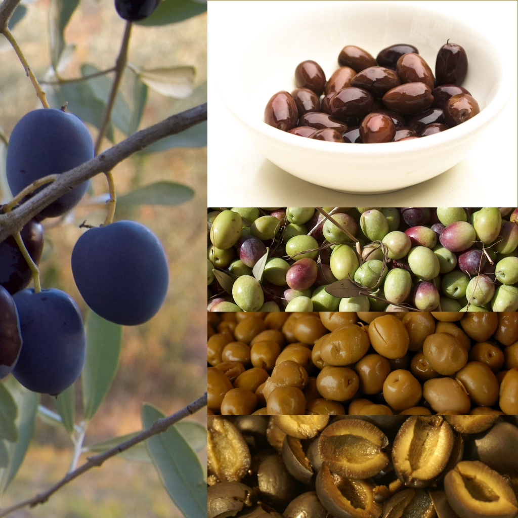 Grafika podręcznika Wikijunior:Owoce. Oliwka, oliwka europejska (Olea europaea).